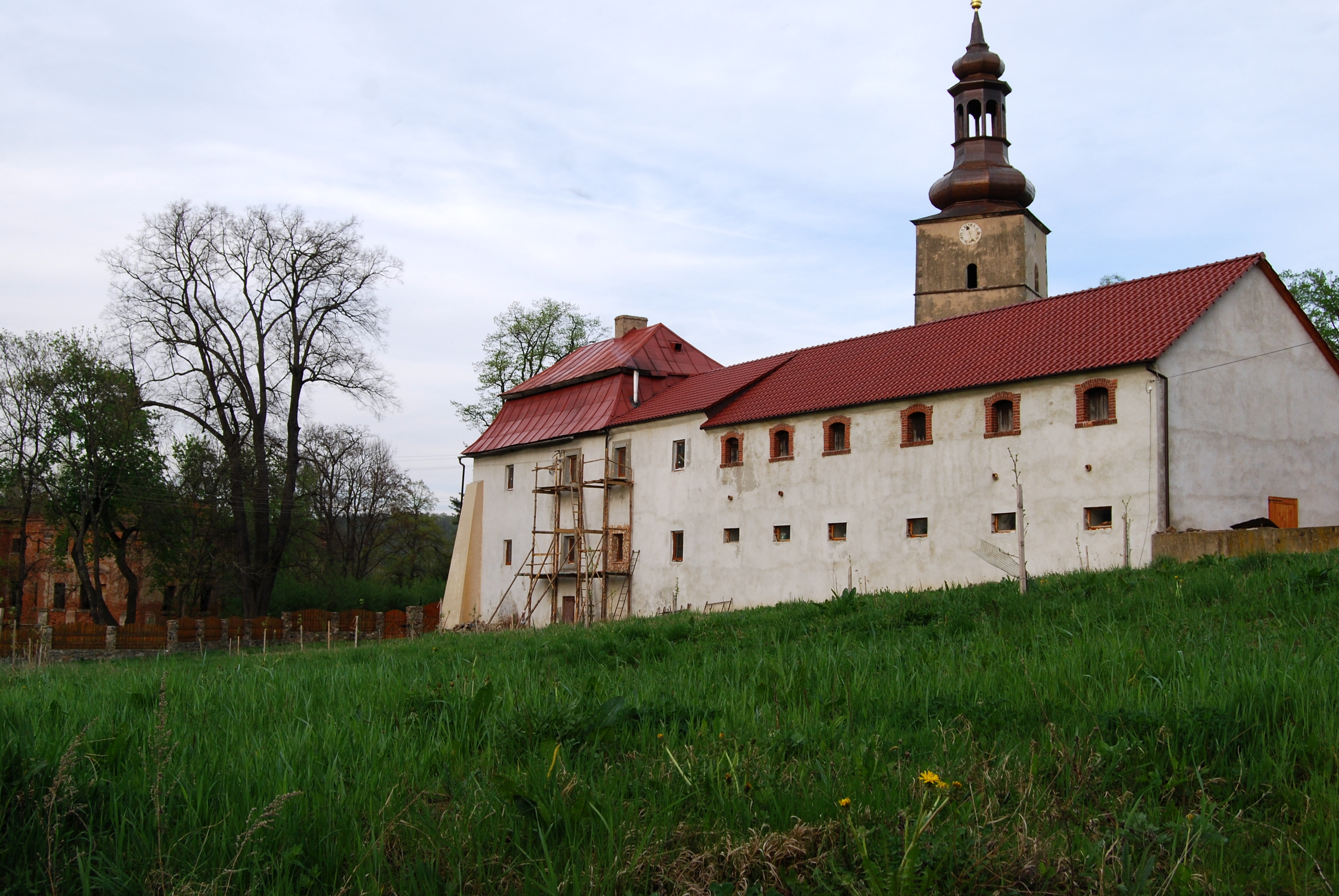 Rząśnik 24 - dawna plebania, poł. XVIII w. (zabytek nr 574 z 18.03.1959)